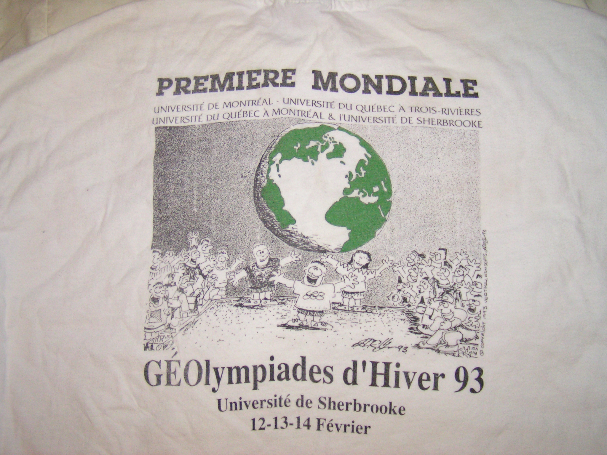 Dos du T-shirt (appartenant à Pierre-André Bordeleau) de la première édition des Géolympiades.